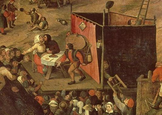 Een opvoering van de klucht 'Een cluyte van Plaeyerwater' op een Vlaamse kermis, detail.